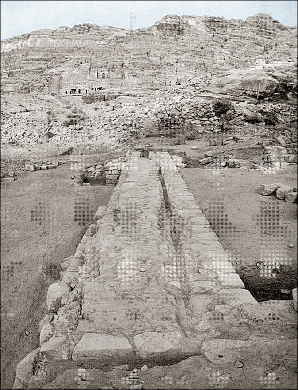 Le Complexe aquatique. Le caniveau incorporé dans le mur.